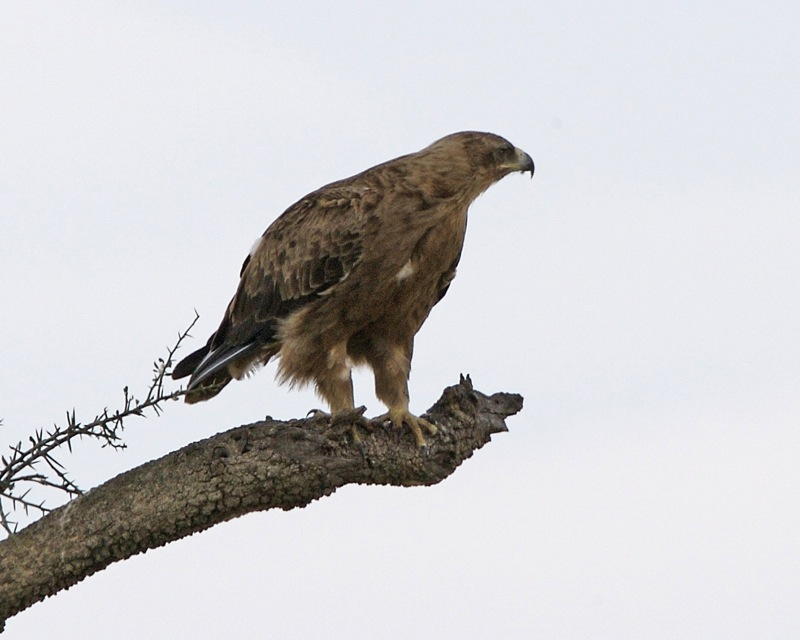 Booted Eagle Hieraaetus pennatus Masai Mara, Kenya 28 August 2008 690V0743